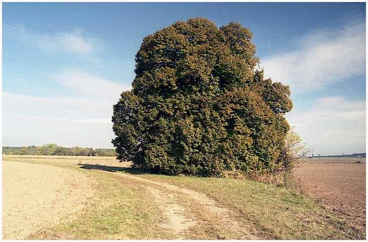 Památná Husova lípa u Dohalic, okres Hradec Králové